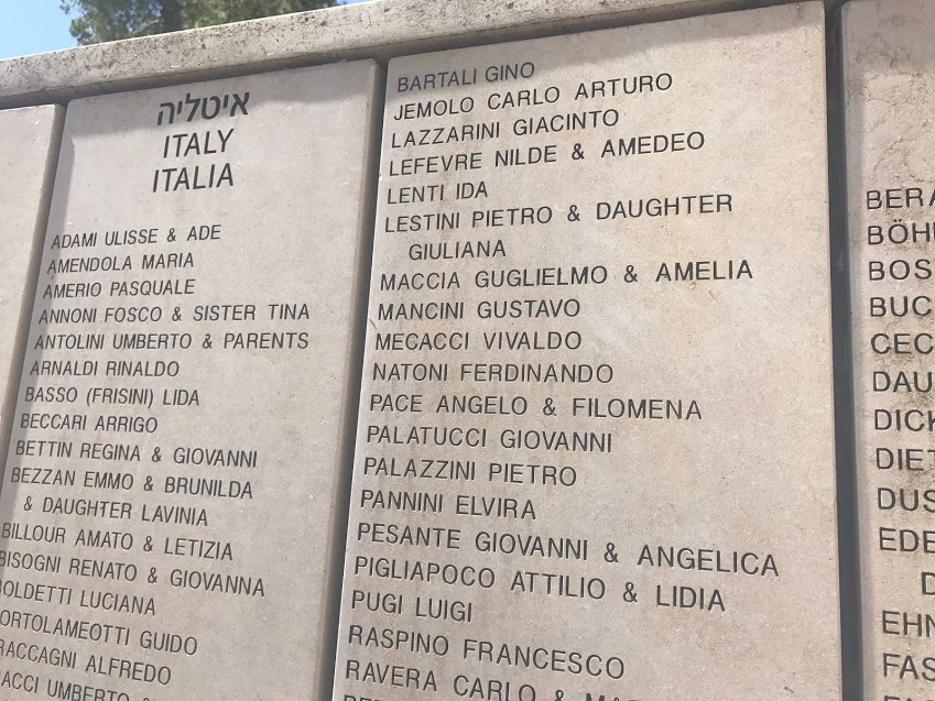 קיר הכבוד של אידה ברונלי-לנטי בגן חסידי אומות עולם,ביד ושם. שמה של אידה נוסף לקיר בשנת 1997.